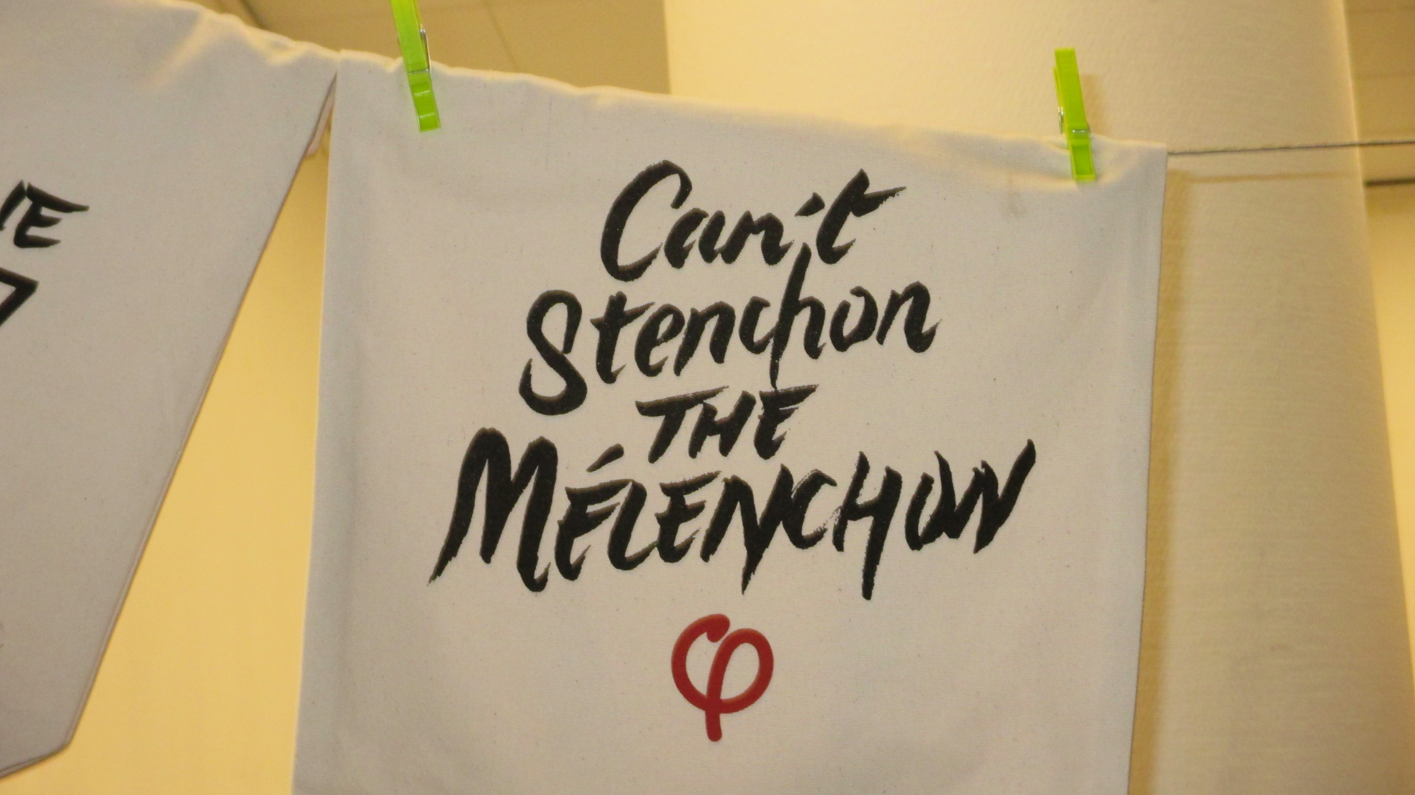 Le slogan Can't Stenchon the Mélenchon exposé sur un stand au meeting de Jean-Luc Mélenchon à Dijon, le 19 avril 2017.